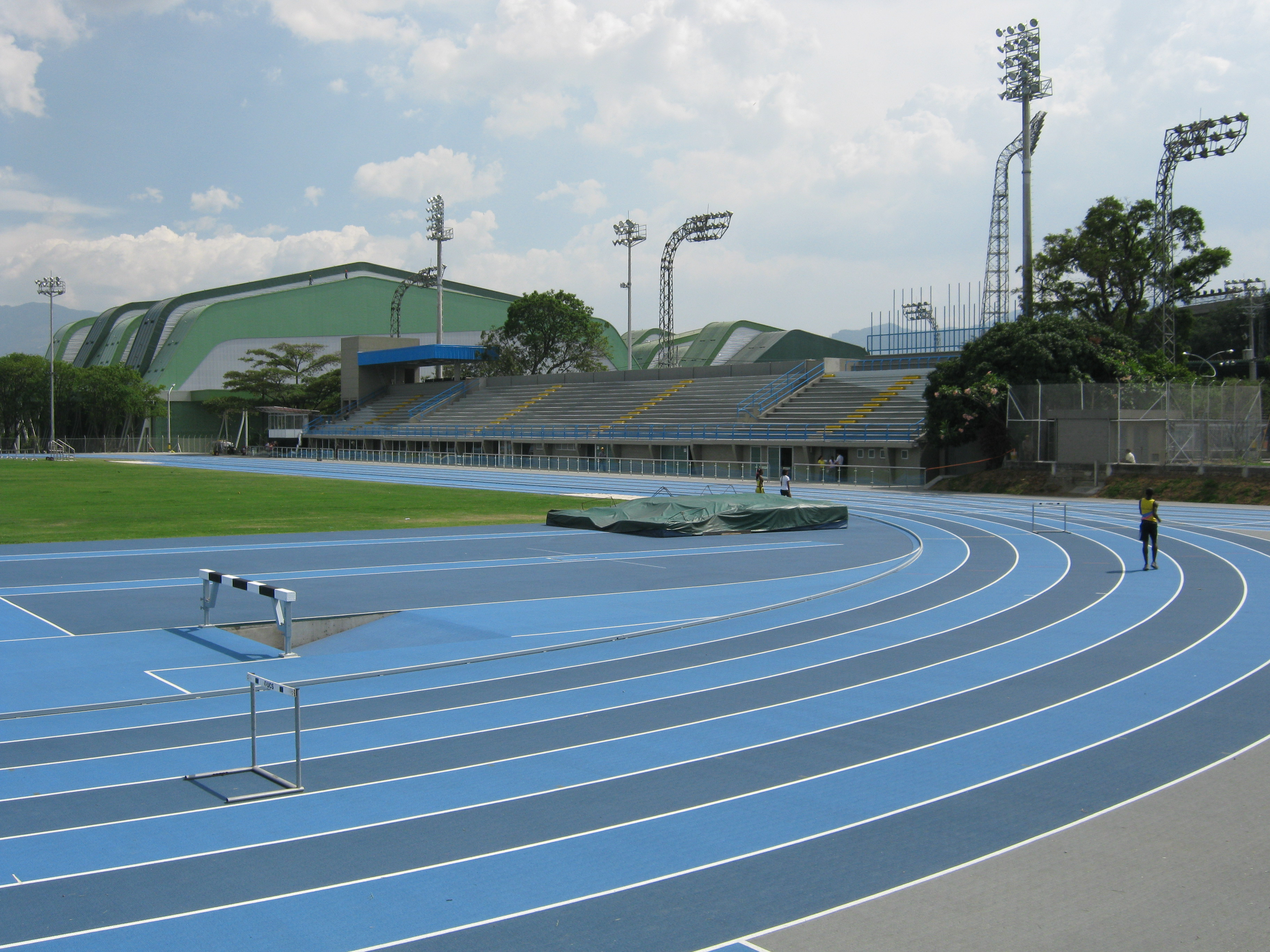 Estadio de Atletismo, en la Unidad Deportiva Atanasio Girardot. Medellín. Colombia.